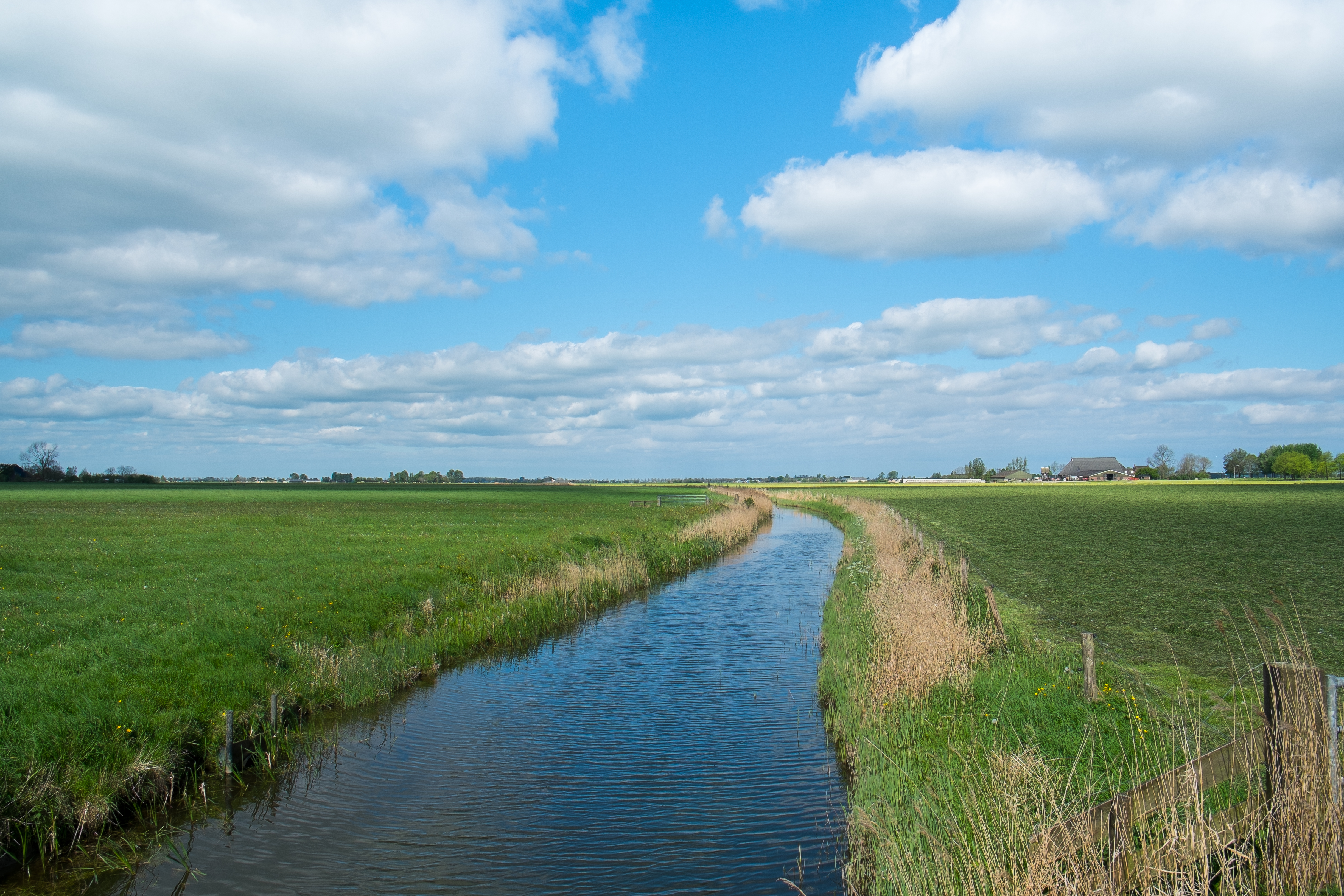 Keegensterried vanaf het Keegensterpad (richting noordwesten)